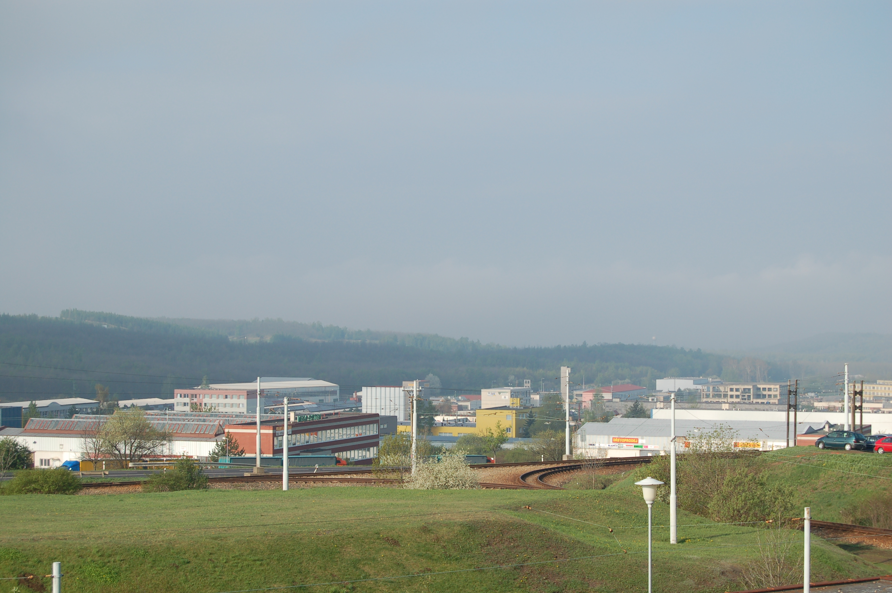 Blick auf Industriegebiet Velebudice in Most